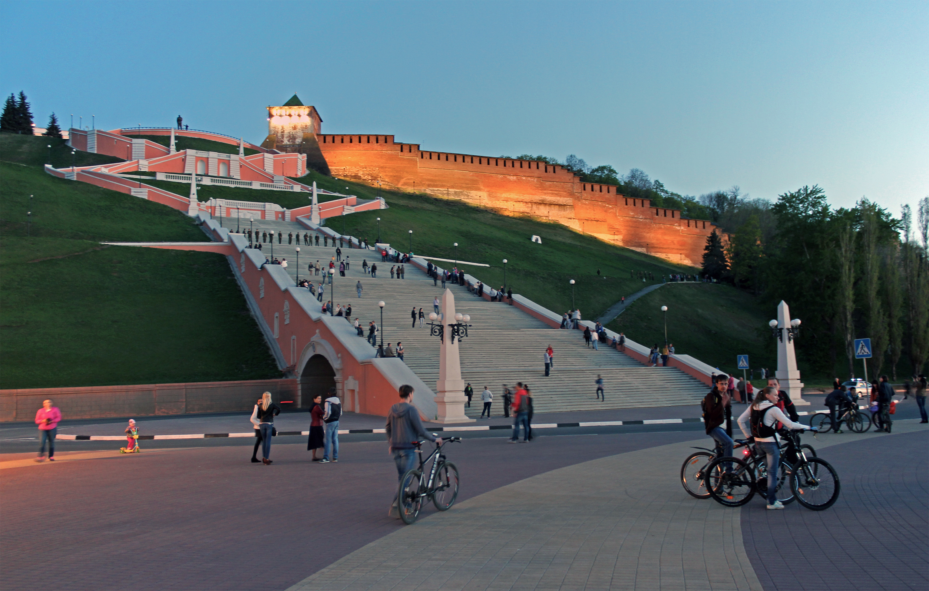 Лестница на Волжском откосе (Чкаловская лестница) (Нижегородская область, Нижний Новгород, Волжский откос, между Верхневолжской и Нижневолжской набережными)